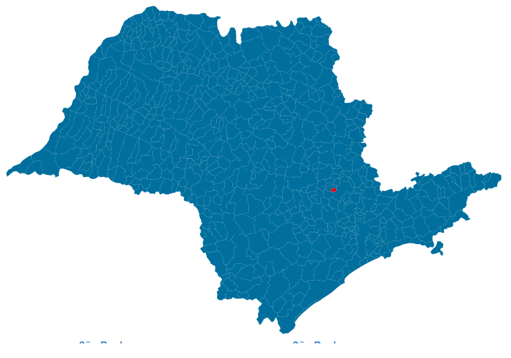 Resultados da eleição para governador de São Paulo em 2014 por cidades.